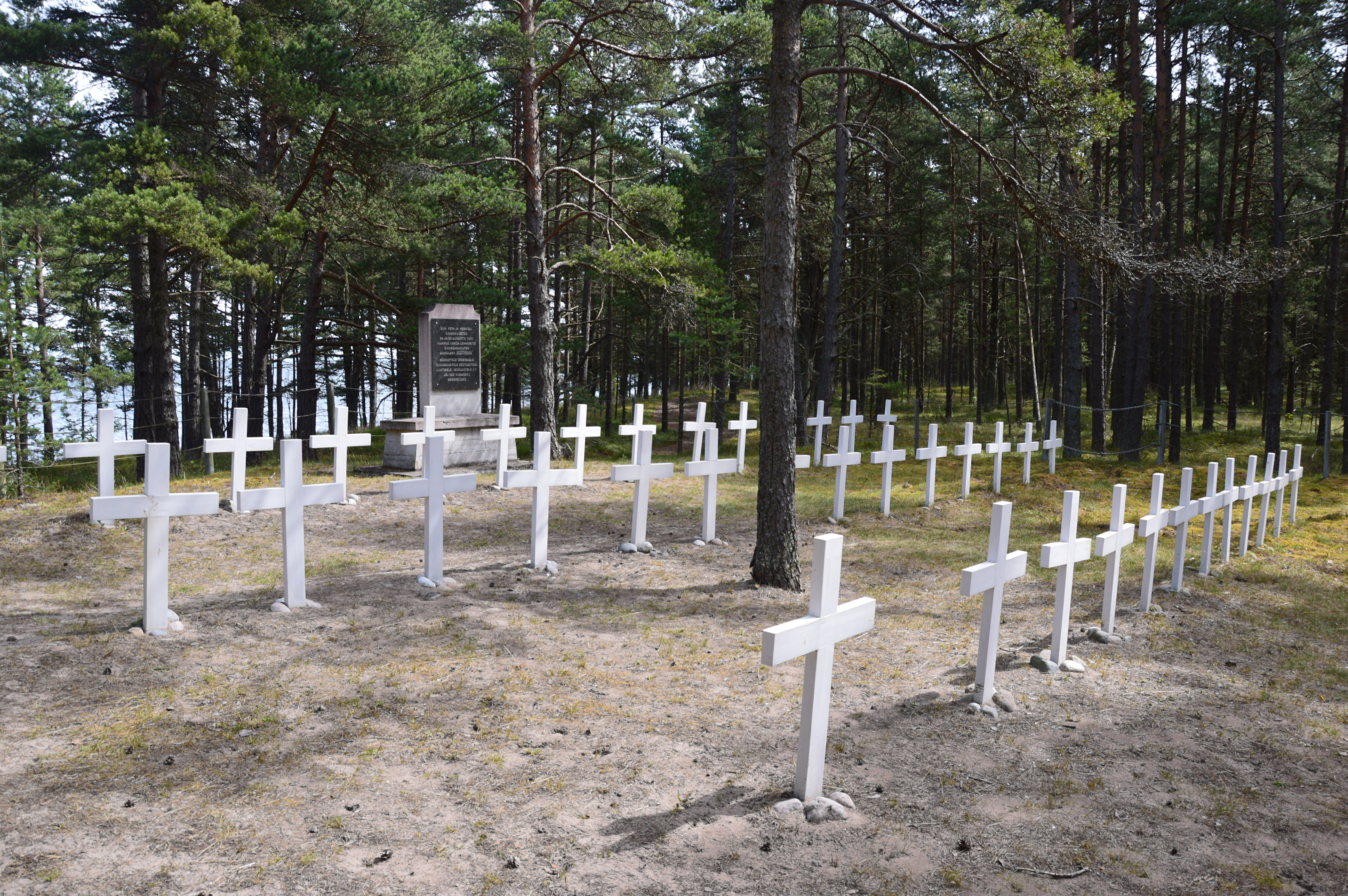 Laeval "Eestirand" 24.08.1941 pommitamise läbi hukkunute matmispaik Prangli saarel.